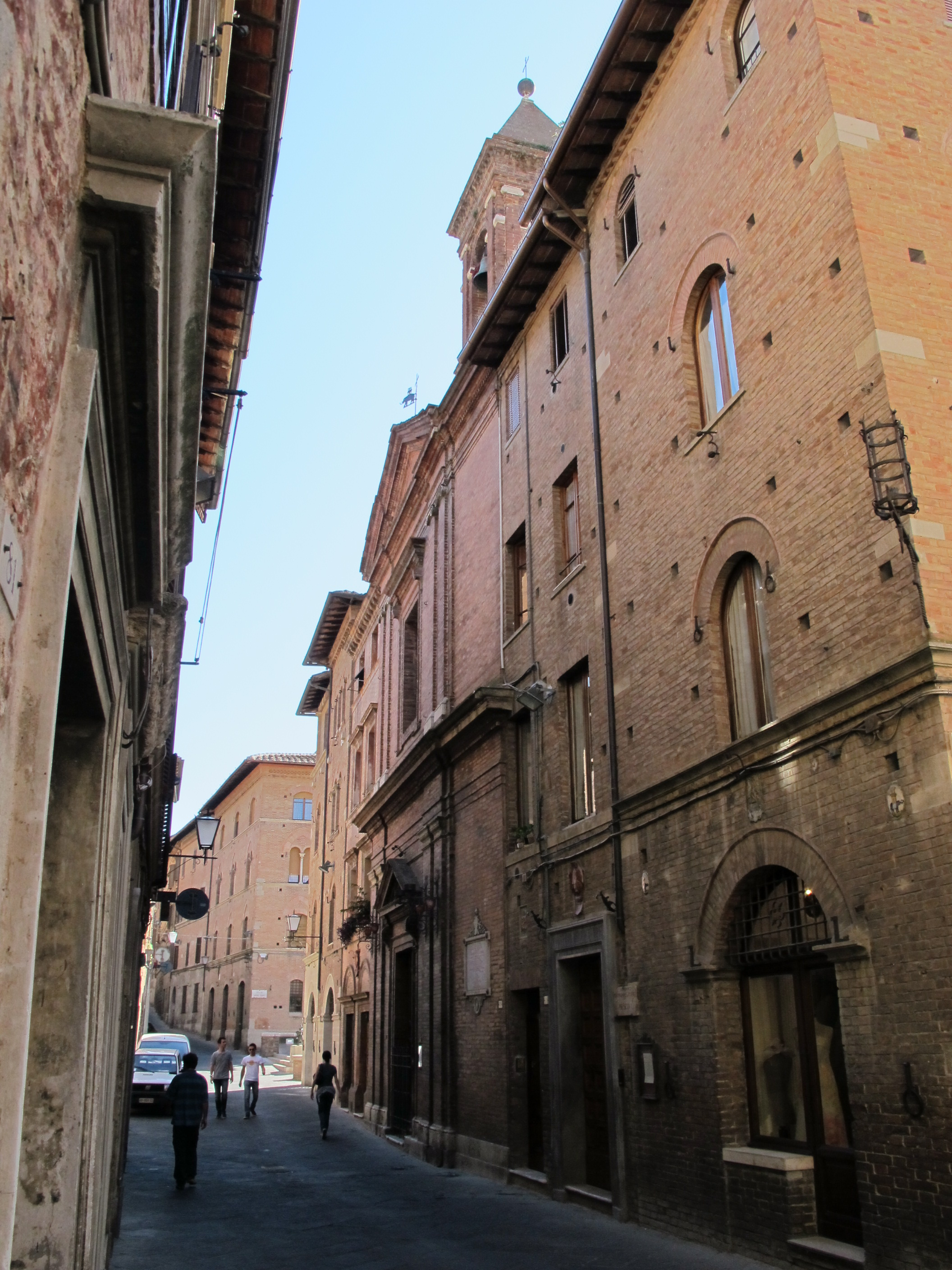 San giacomo, siena